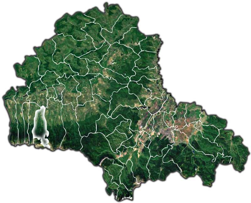 Lisa jud Brasov